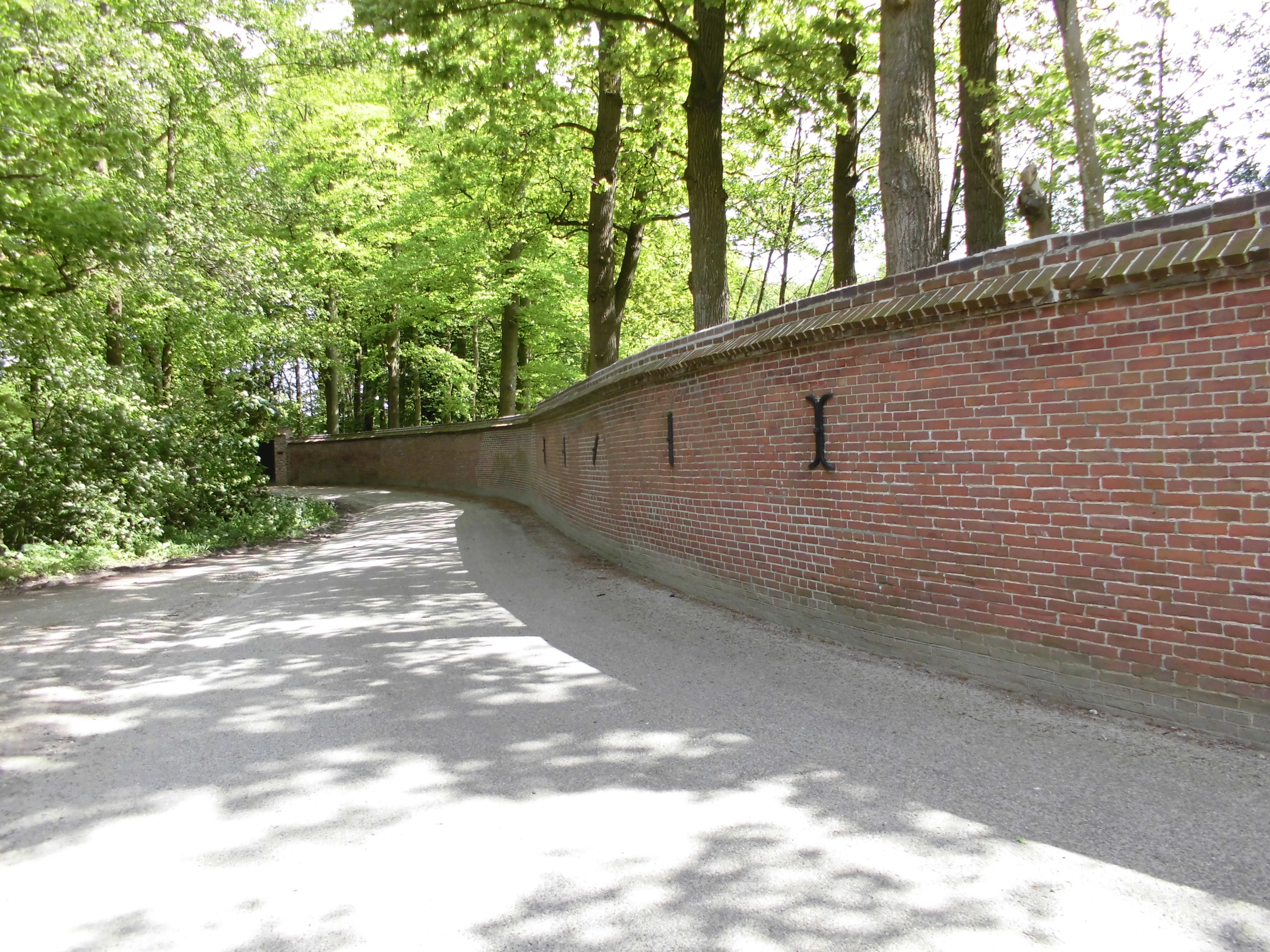 Tuinmuur rond Arca Pacis, Driebergen-Rijsenburg